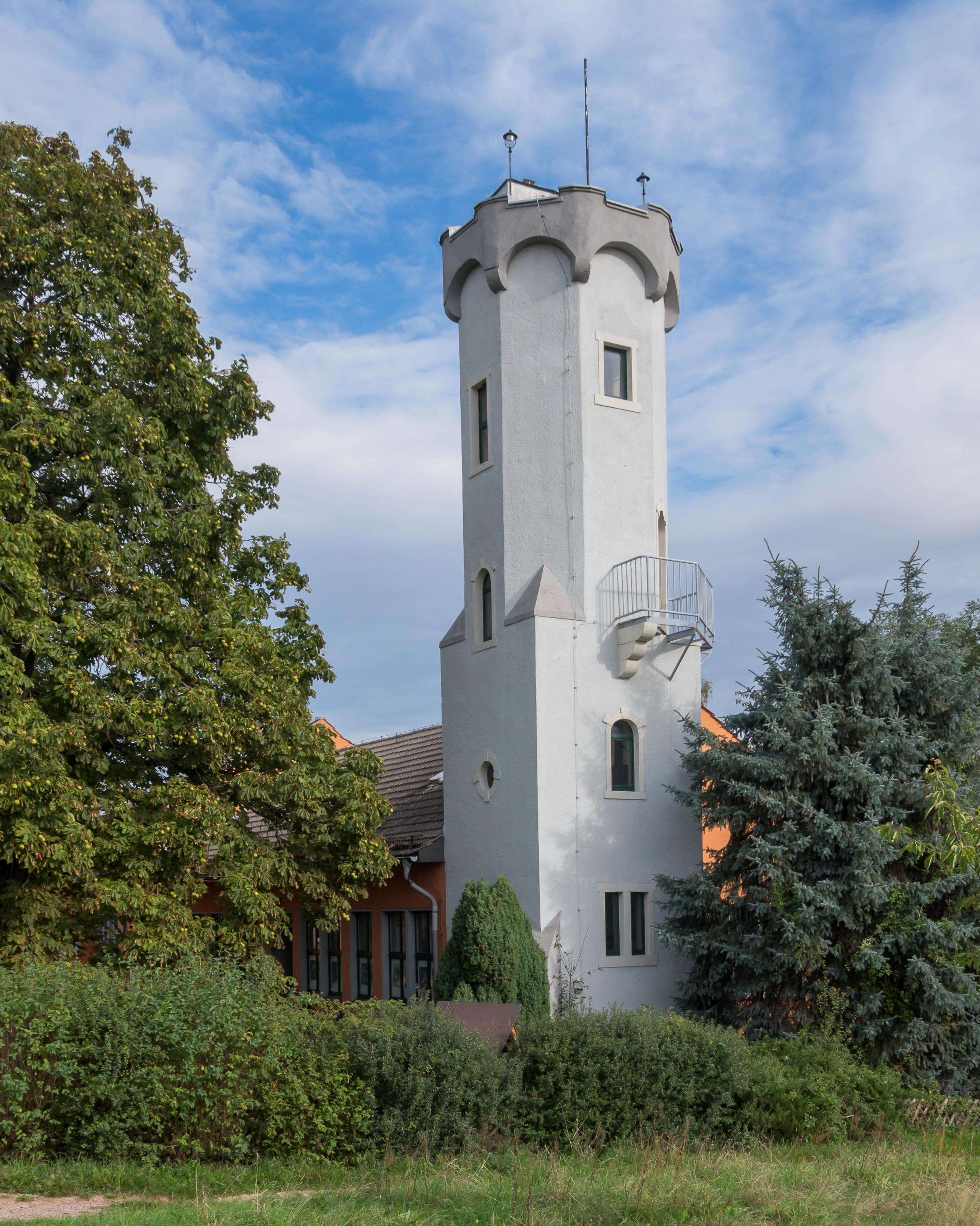 Sörnewitz Boselweg 101 Aussichtsturm auf der Bosel II